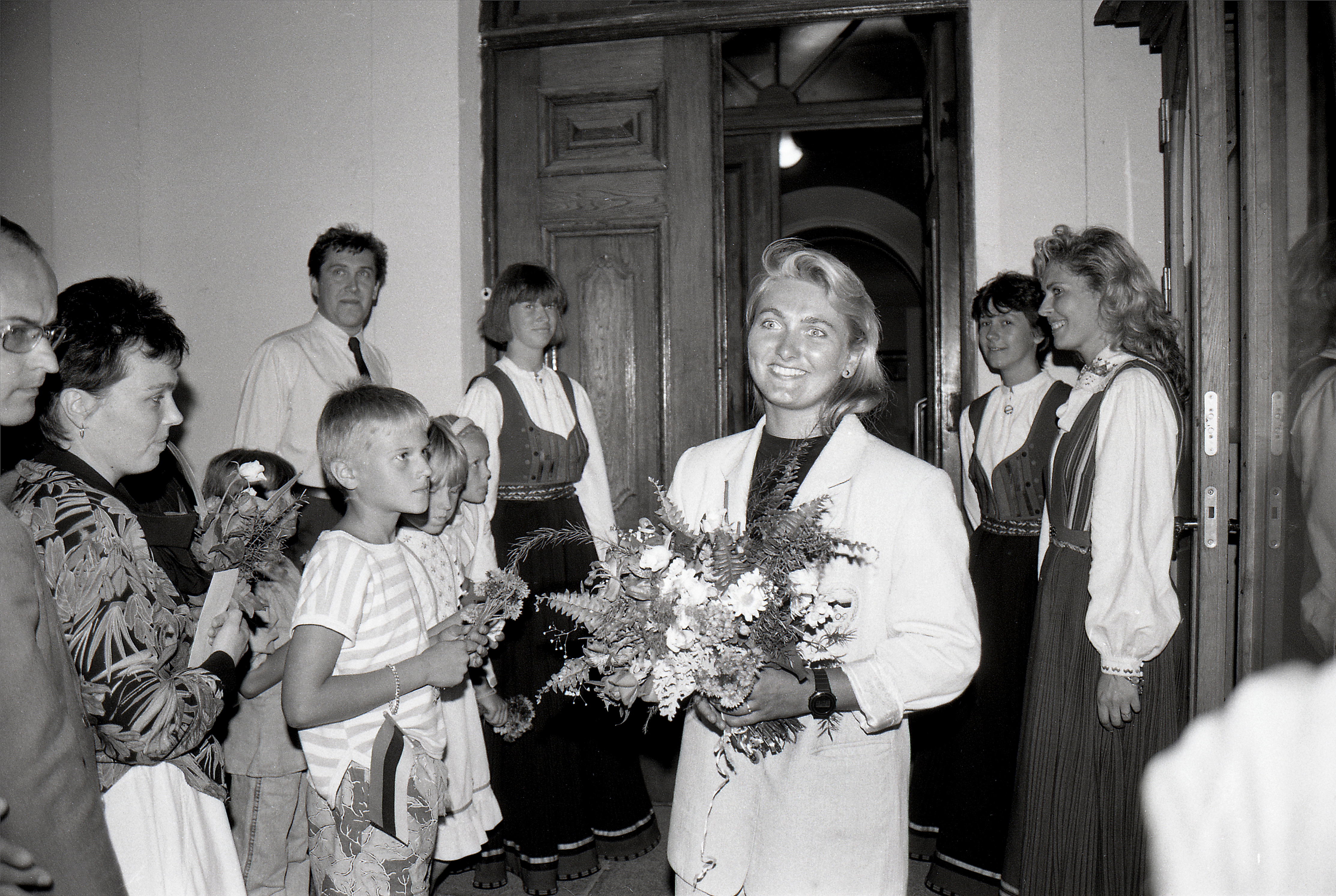 Krista Kruuv 1992. aastal